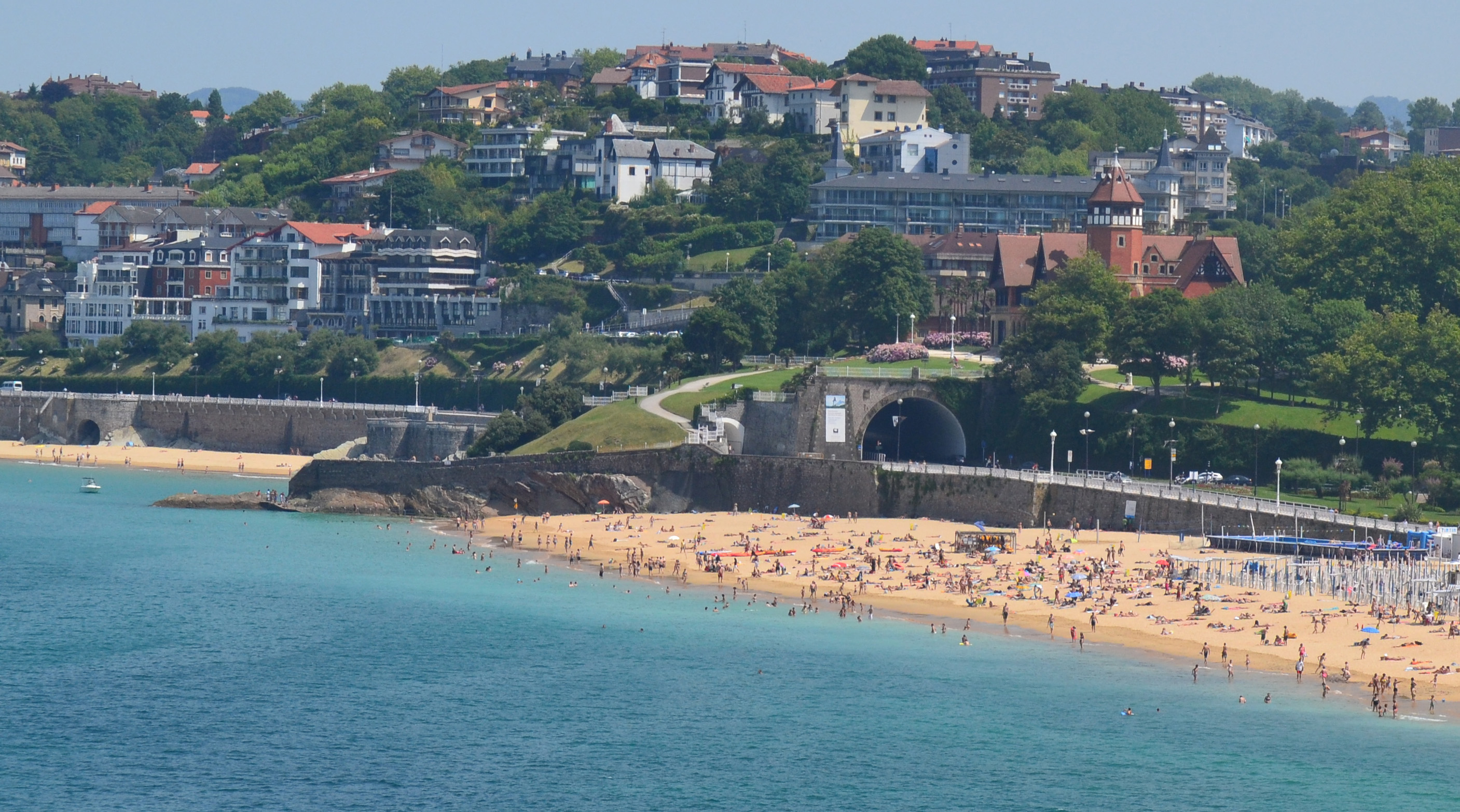 Ondarreta hondartza, Loretopea eta Miramar jauregia. Donostia, Gipuzkoa. Euskal Herria. Ondarreta beach, Loretopea and Miramar palace. Saint Sebastian, Gipuzkoa. Basque Country.